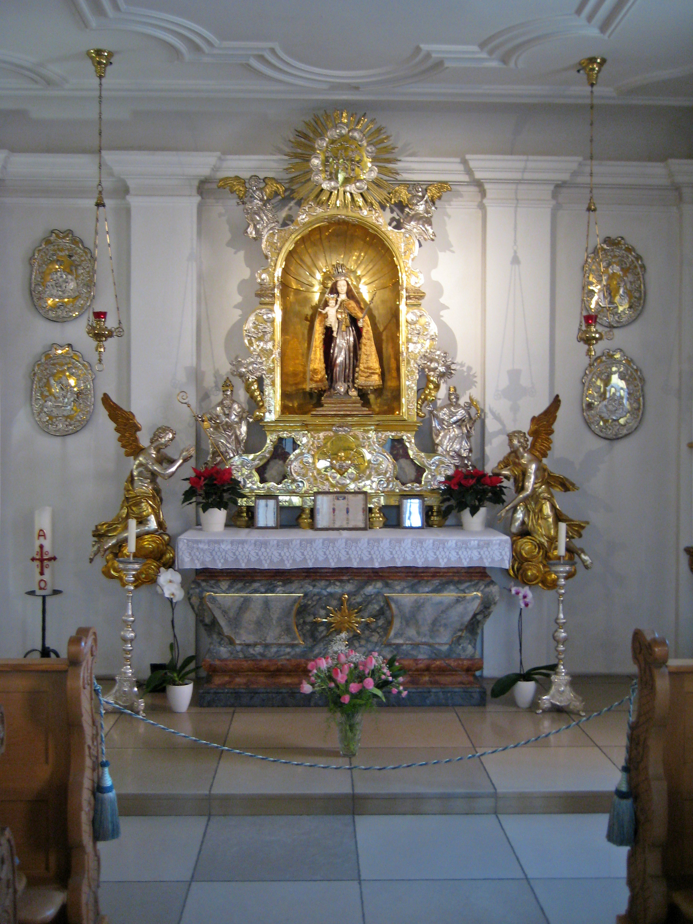 Gnadenkapelle in der Mariahilfkirche in München.